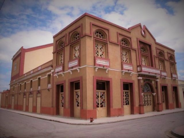 Fundado en el año 1856